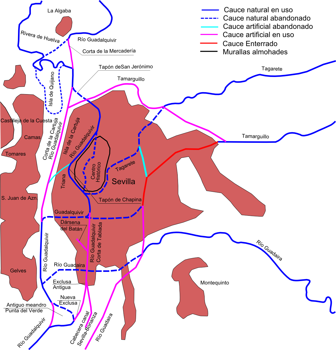 Río Guadalquivir con sus afluentes a su paso por Sevilla con las modificaciones realizadas en su curso a lo largo de los siglos, realizado con Inkscape